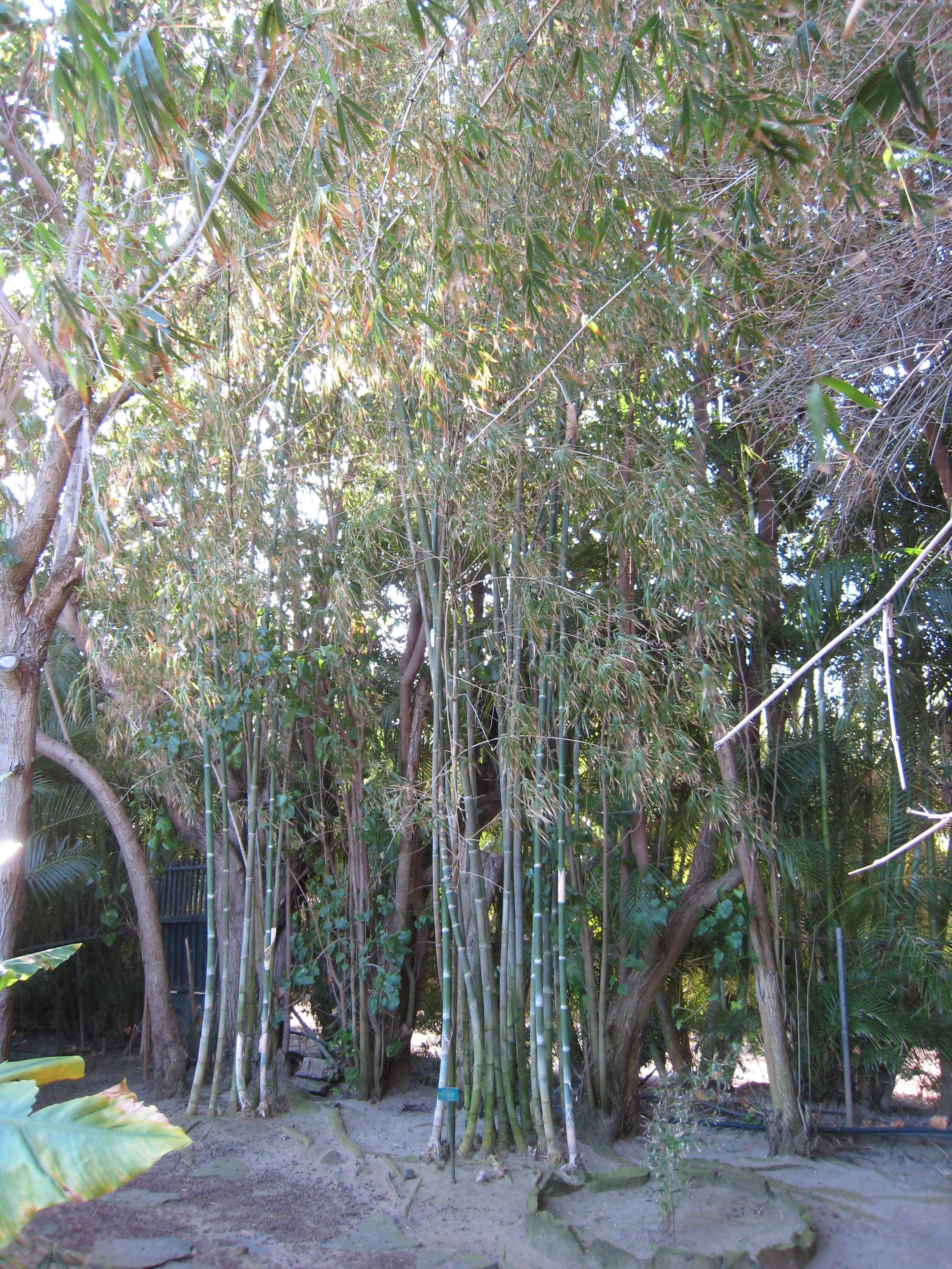 Gigantochloa albociliata au Jardin d'Éden de Saint-Paul, sur l'île de La Réunion.